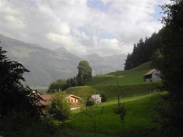 Bas-Intyamon FR, Suisse